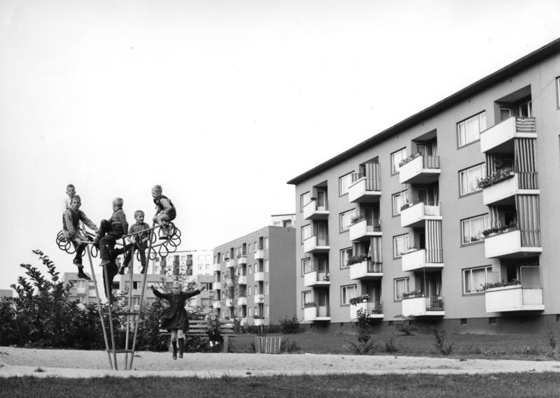 Oktober 1960 Bremen-Vahr Sozialer Wohnungsbau